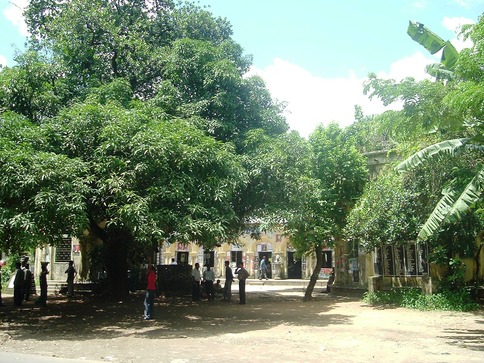 Modhur Canteen, DU, Dhaka.